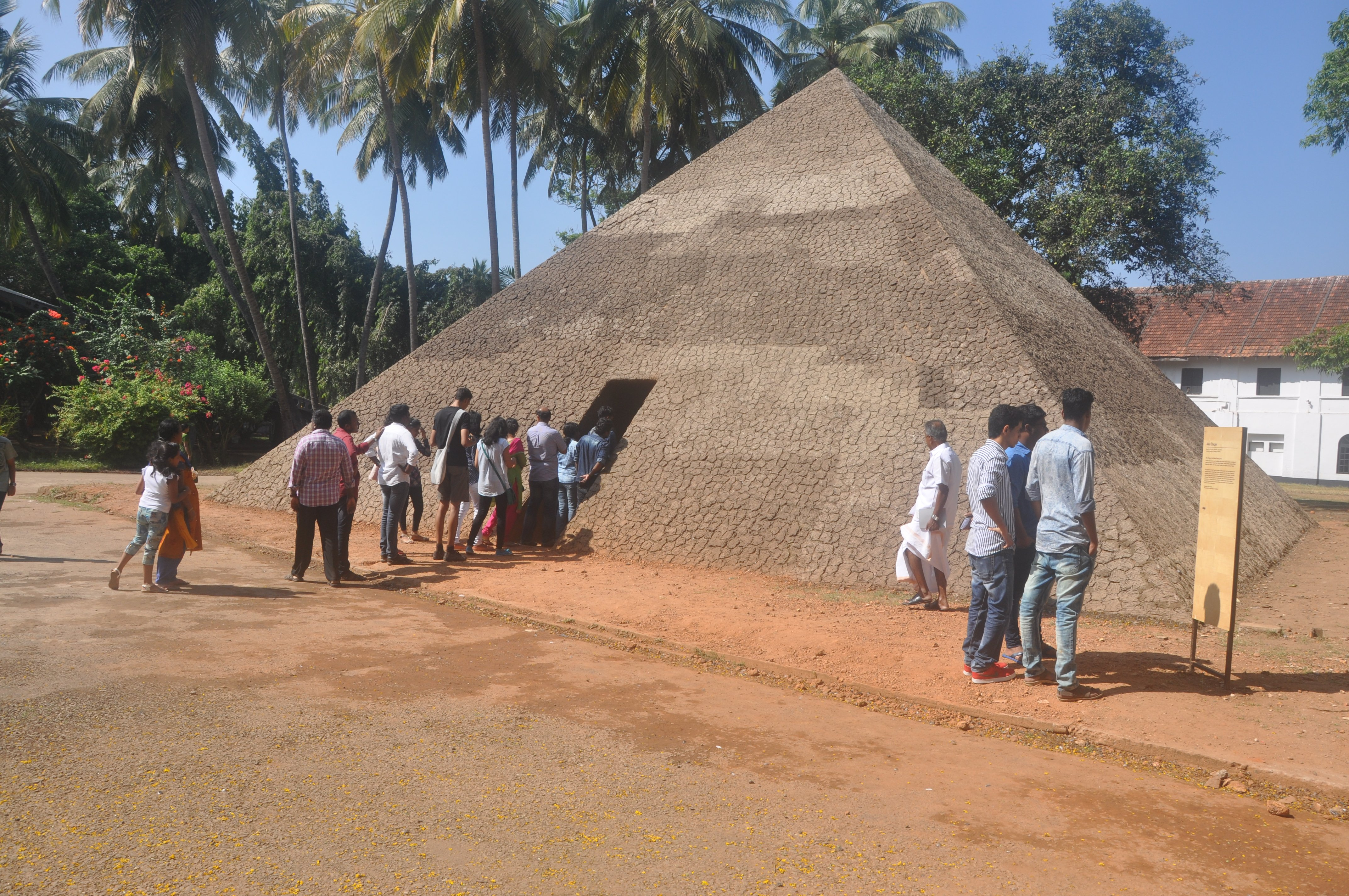 കൊച്ചി - മുസിരിസ് ബിനലെ 2016 ലെ ദ പിരമിഡ് ഓഫ് എക്‌സൈൽഡ് പൊയറ്റ്‌സ് എന്ന പ്രതിഷ്ഠാപനം കാണുന്നവർ